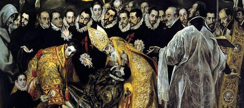 El entierro del señor de Orgaz, más conocido como El entierro del conde de Orgaz, es un óleo sobre lienzo pintado en estilo manierista por El Greco entre los años 1586 y 1588. Fue realizado para la iglesia de Santo Tomé de Toledo, (España), donde aun permanece, y es considerada una de las las mejores obras de su autor. El cuadro representa el milagro en el que, según la tradición, San Esteban y San Agustín de Hipona bajaron del Cielo para enterrar personalmente a Gonzalo Ruiz de Toledo, señor de la villa de Orgaz y fallecido en 1323, en la iglesia de Santo Tomé, como premio por su vida ejemplar de devoción, humildad y obras de caridad. El Greco aceptó el encargo de realizar la obra en 1586, algo más de dos siglos y medio después de los hechos que en ella representó.